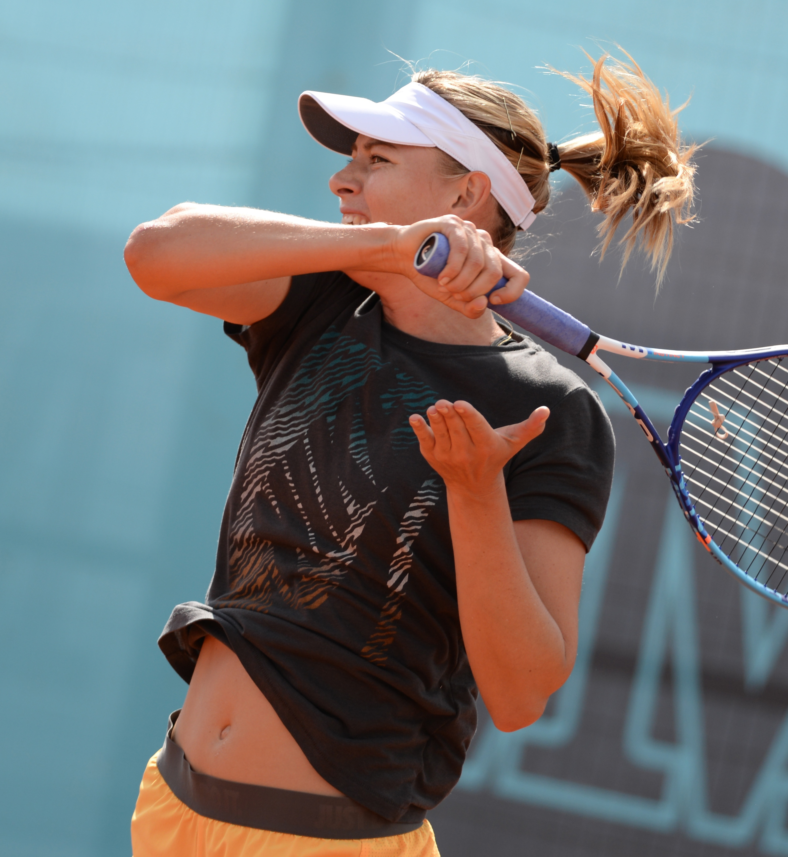 Maria Sharapova